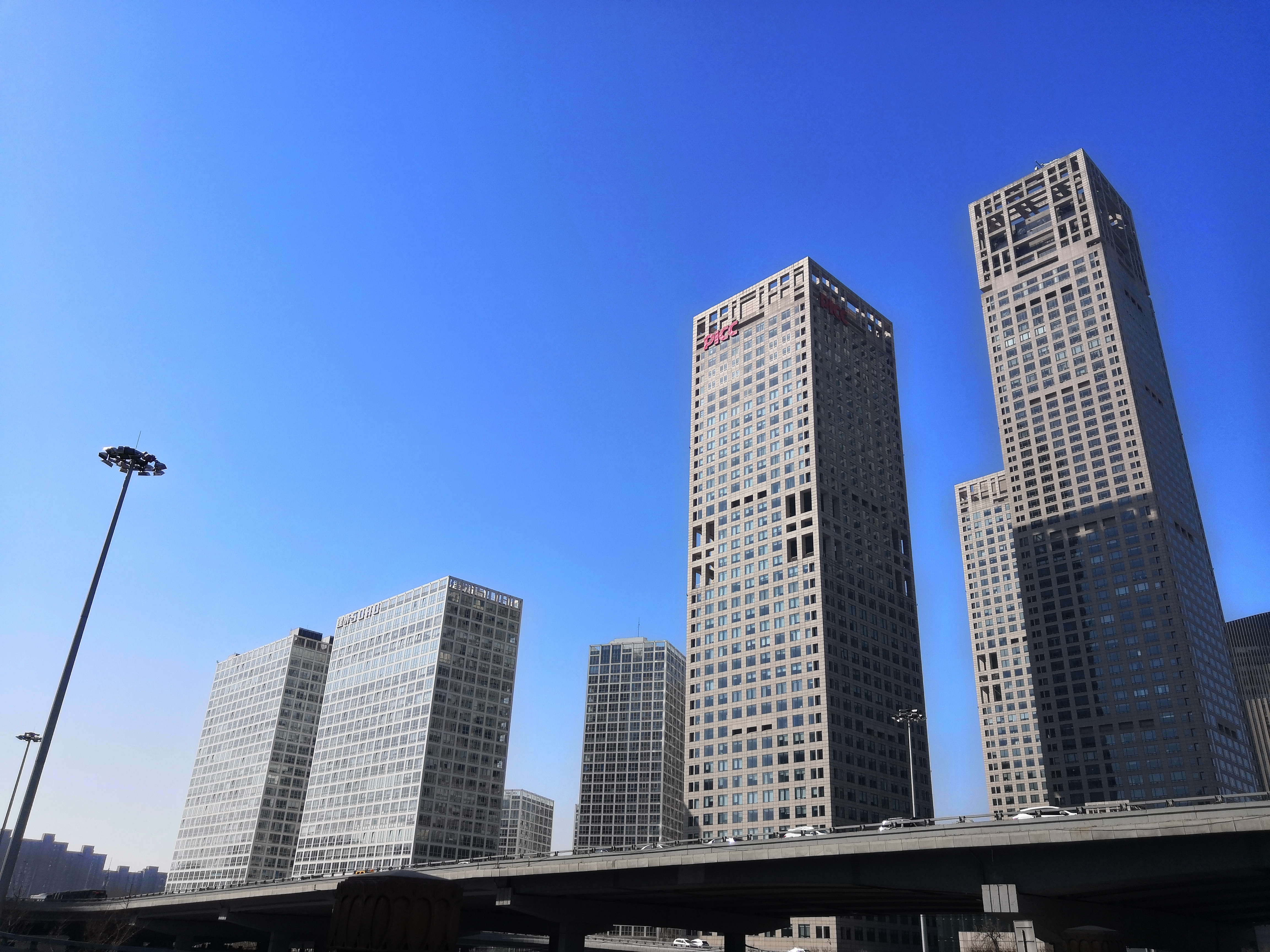 中文（中国大陆）: 建外SOHO 银泰中心